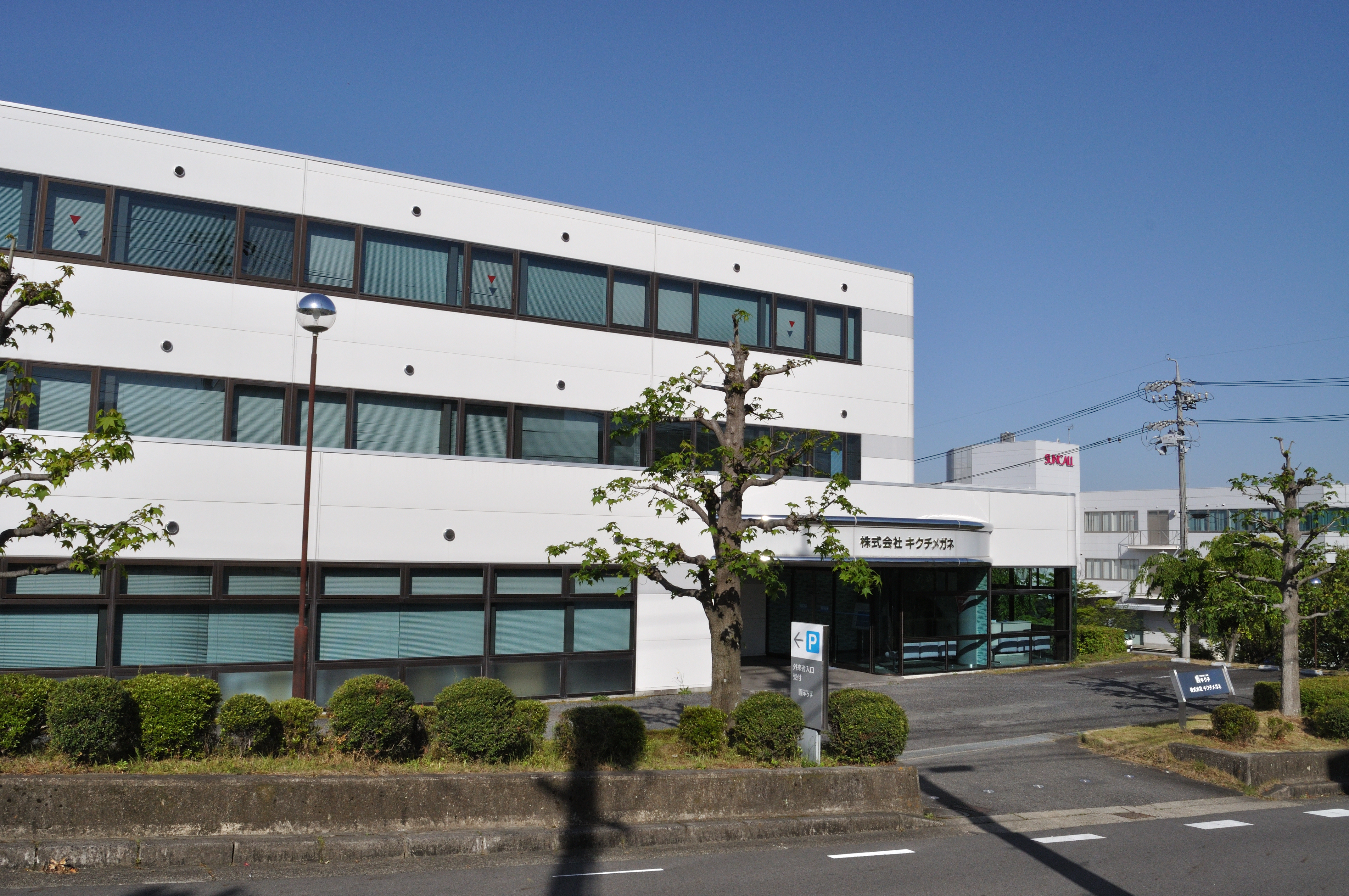 キクチメガネの本社画像